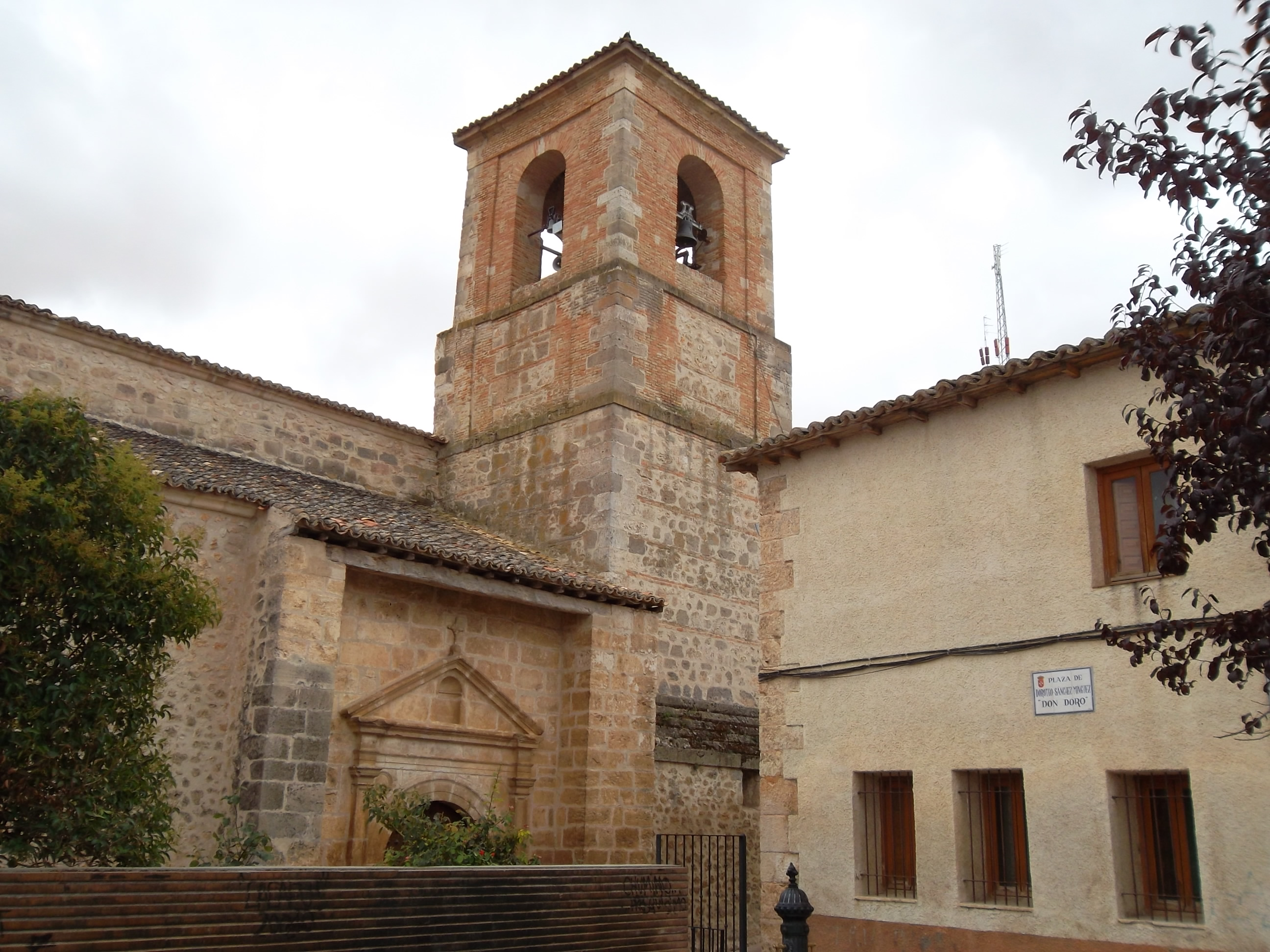 Peñalver-Iglesia de Santa Eulalia de Mérida fue construida en el primer tercio del silgo XVI.